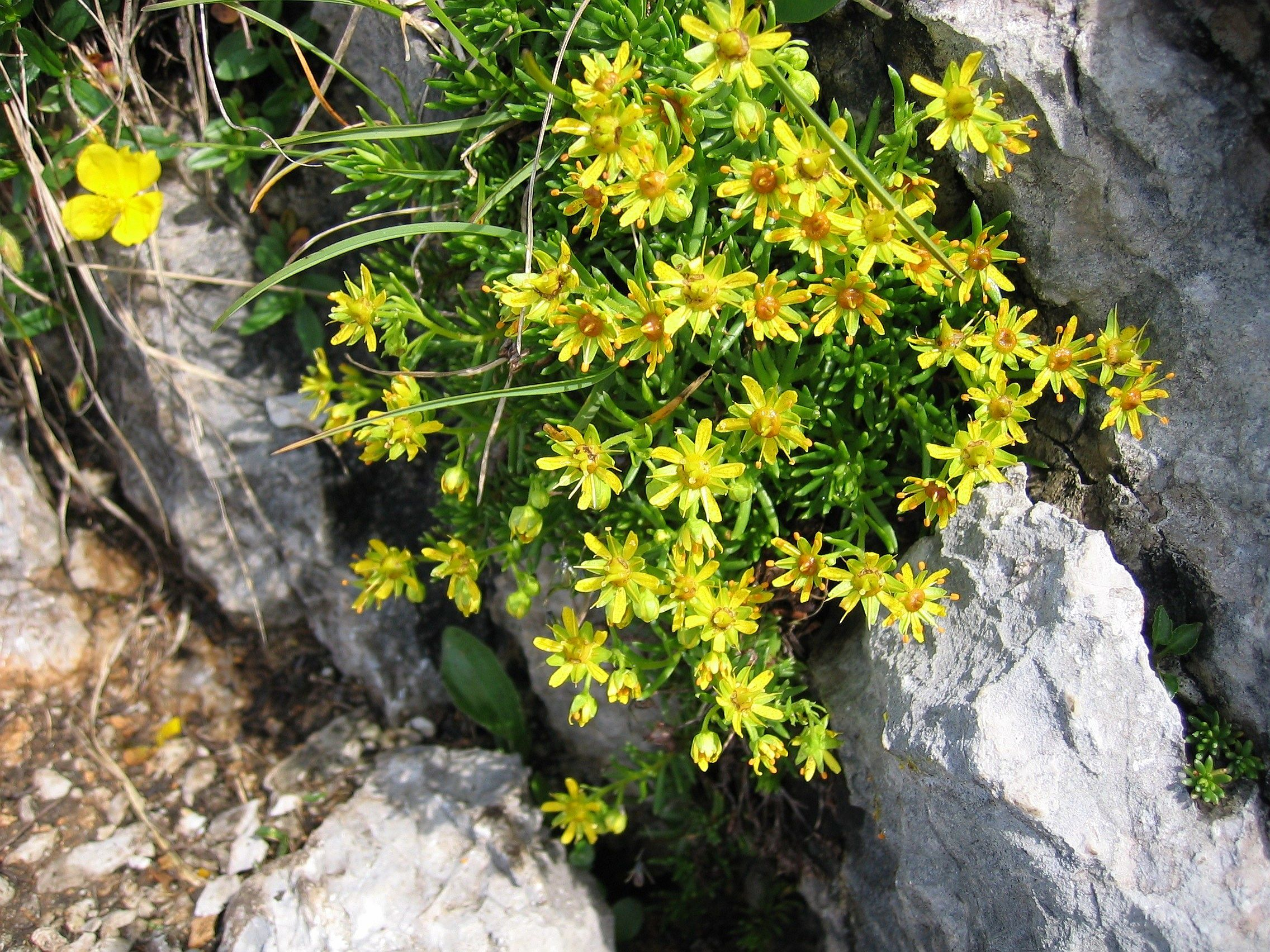 Saxifraga_aizoides Großer Pyhrgas, Upper Austria, Austria